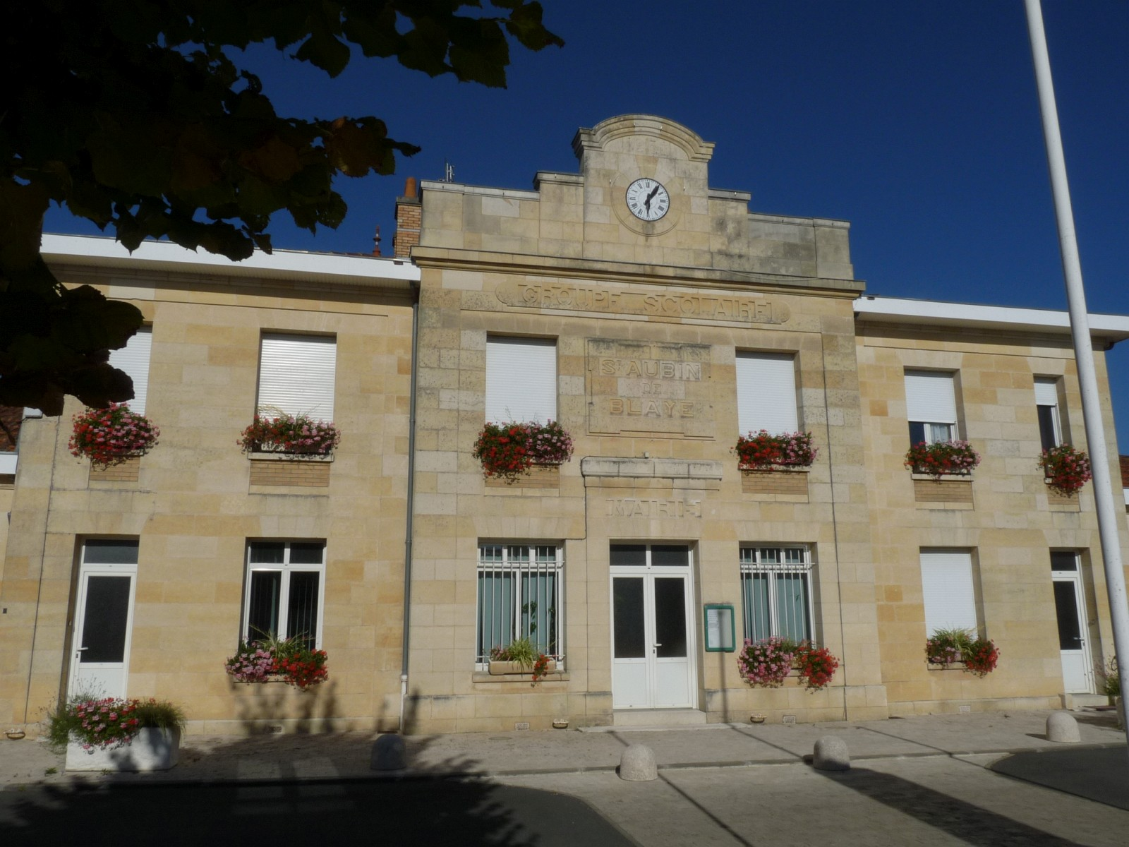 Mairie, St-Aubin-de-Blaye, Gironde, France